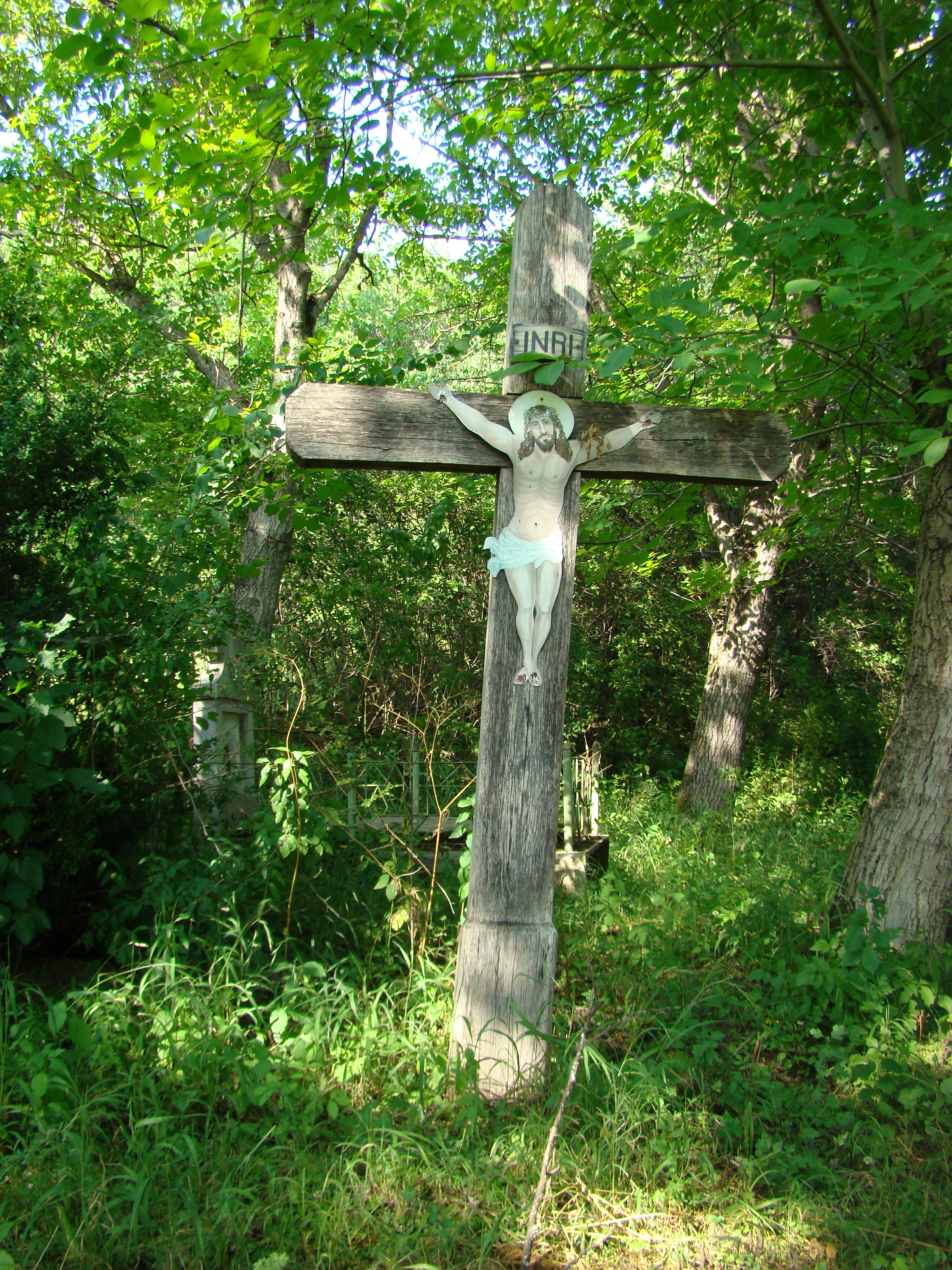 Biserica de lemn "Sf. Ioan Botezătorul" , sat COMLOD; comuna MILAŞ